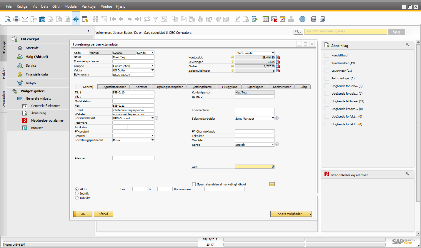 SAP Business One Klient'en